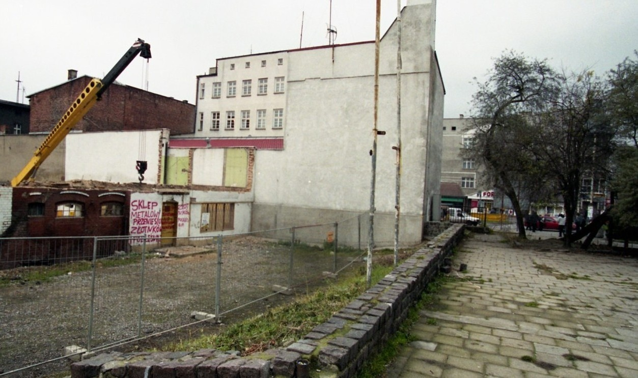 Stargard. Tyły ulicy Wyszyńskiego